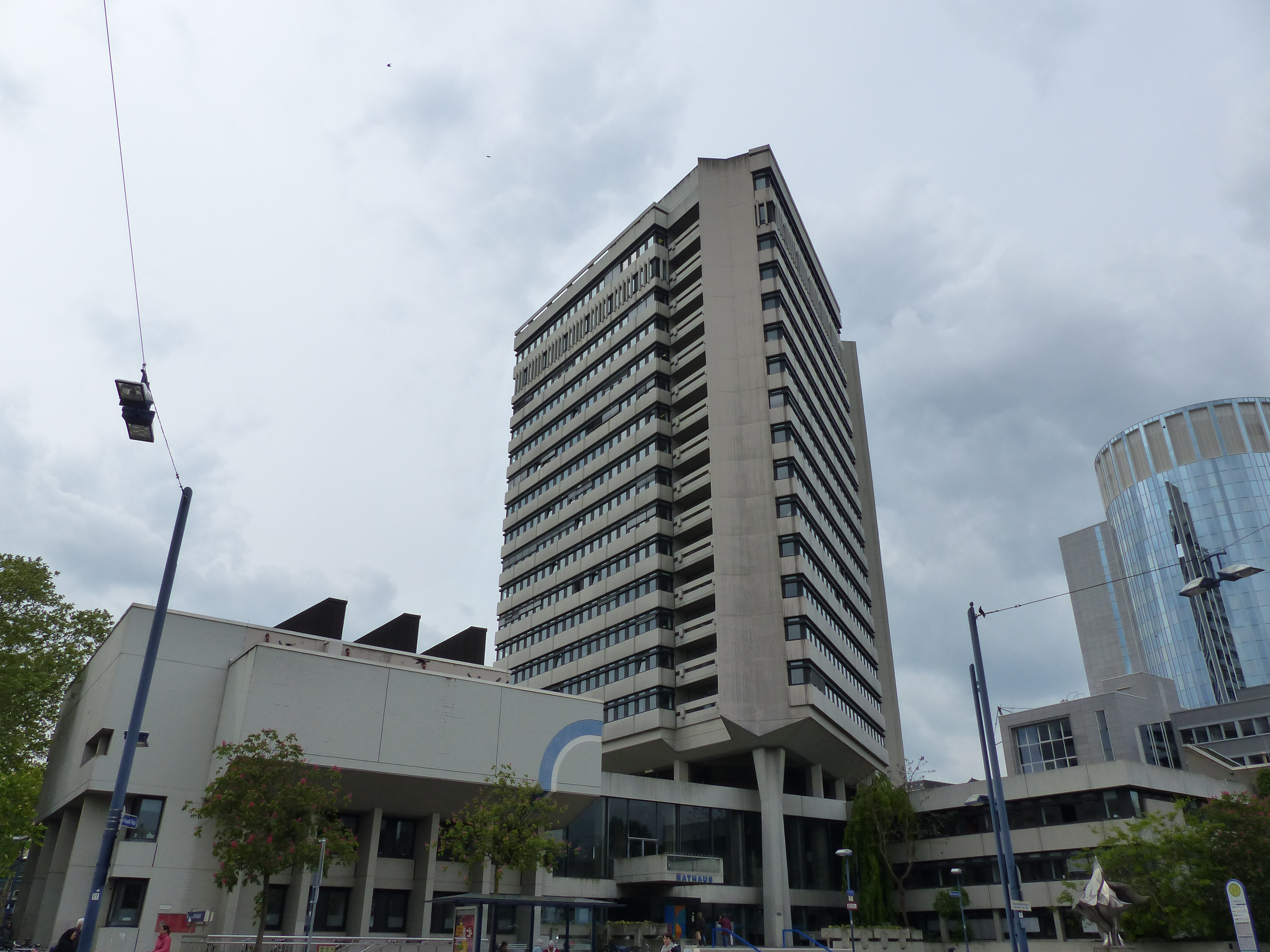 Foto vom Rathaus in Offenbach am Main